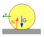 tegenwerkend moment bij rollende wrijving